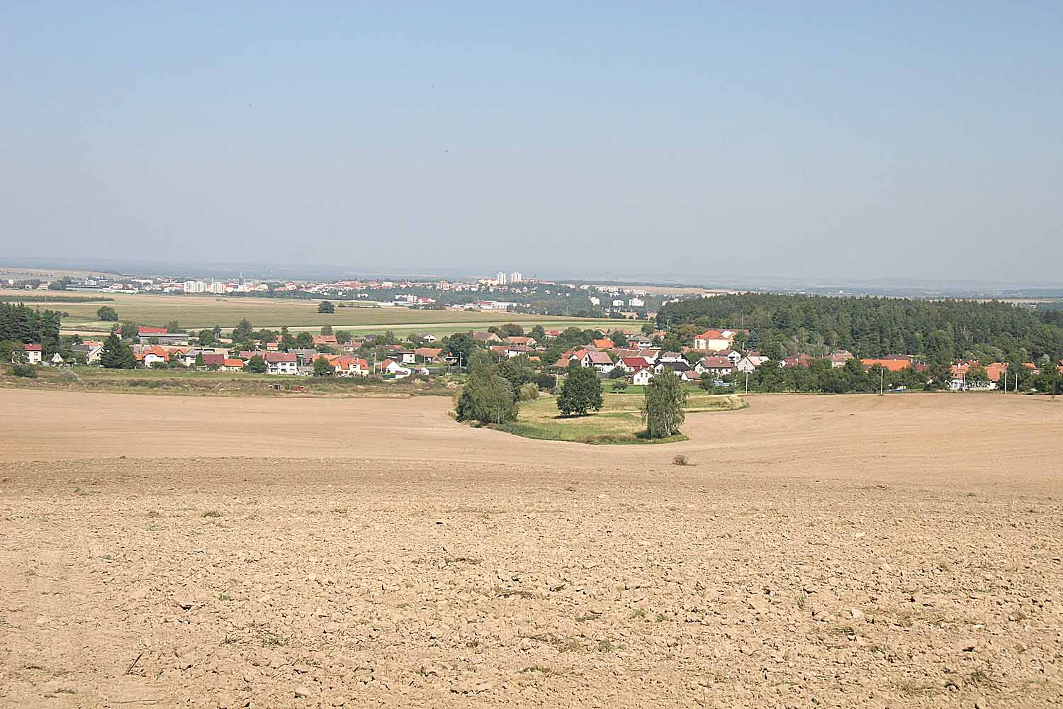 Rabštejnská Lhota, district Chrudim, Pardubice Region autor:Prazak date: 13. 9. 2006